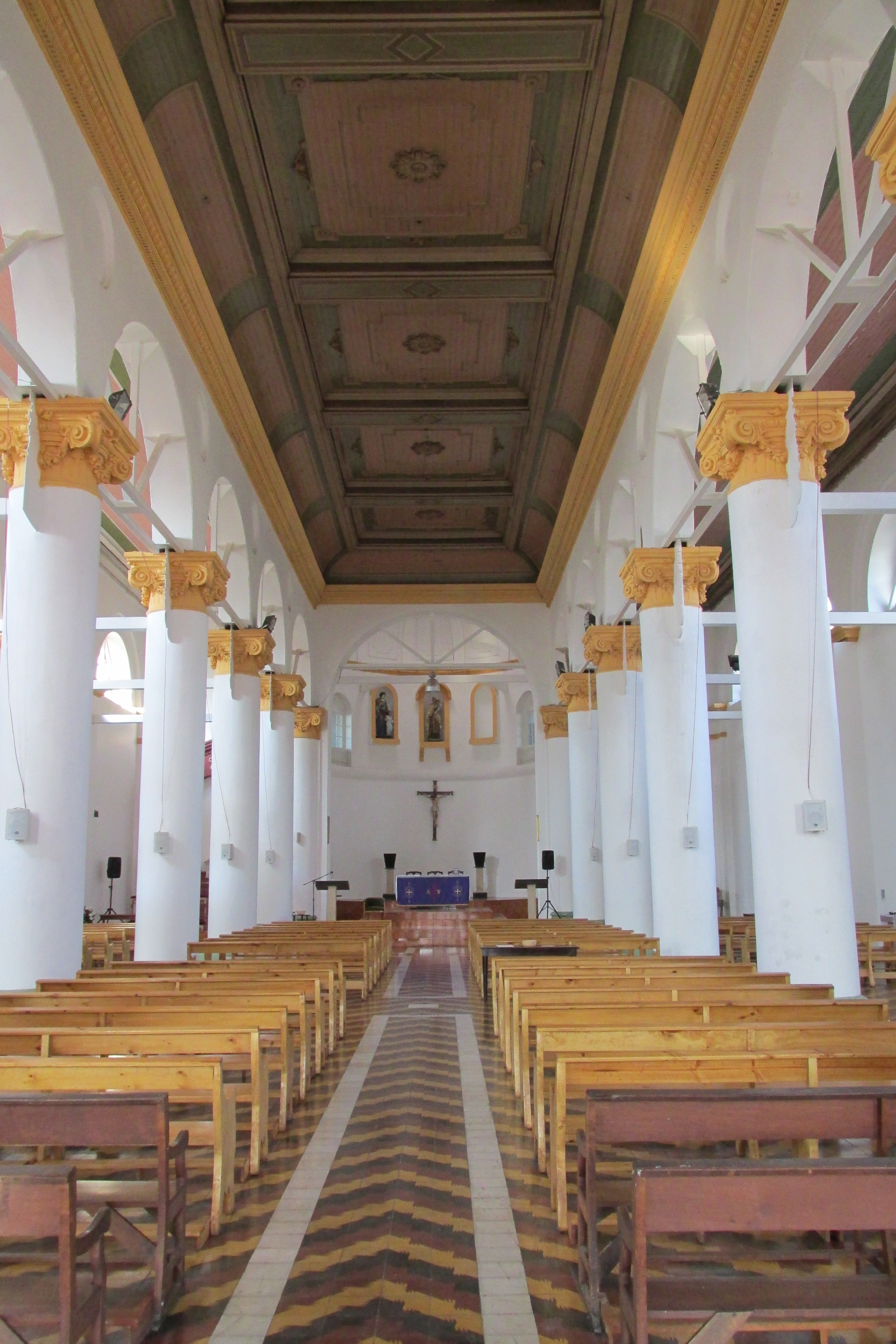 Vista interior Parroquia San Francisco de Asis en Rancagua